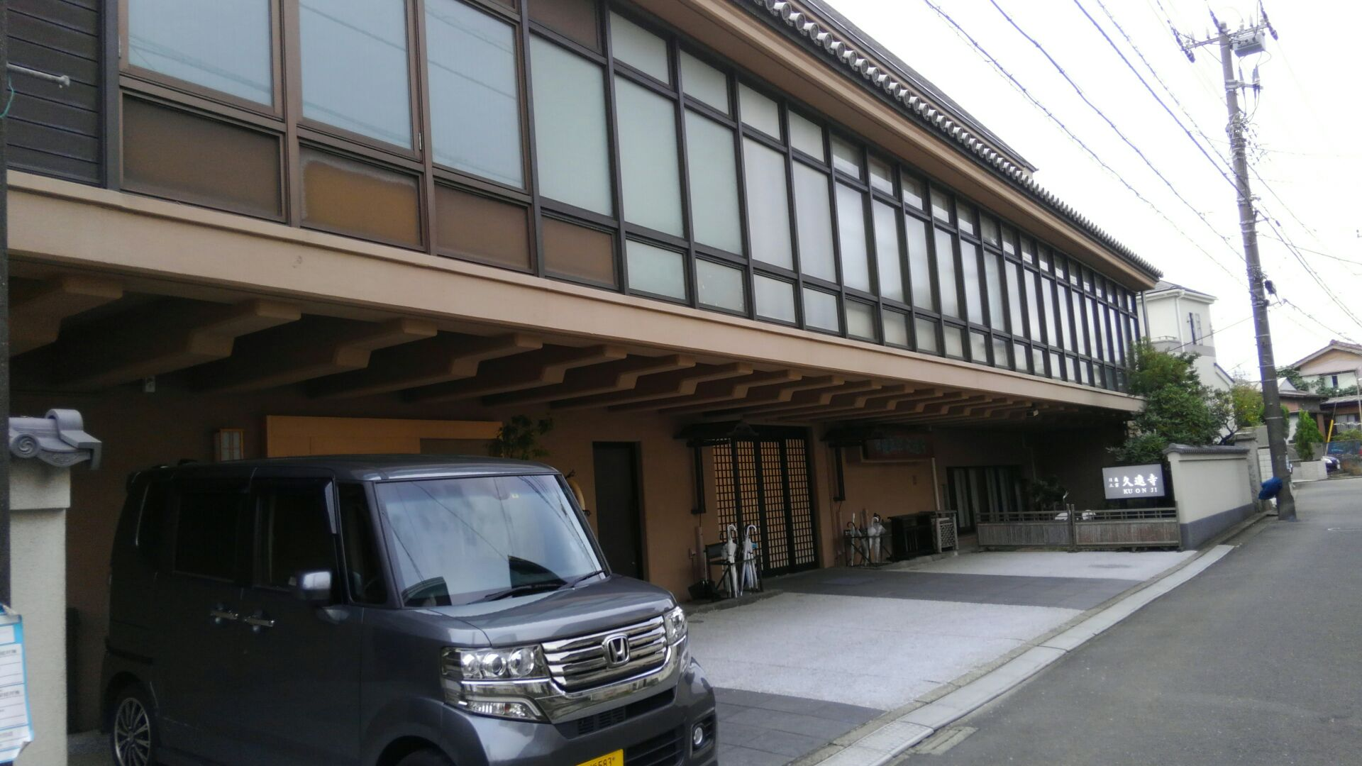 東側市道東南方向から撮影